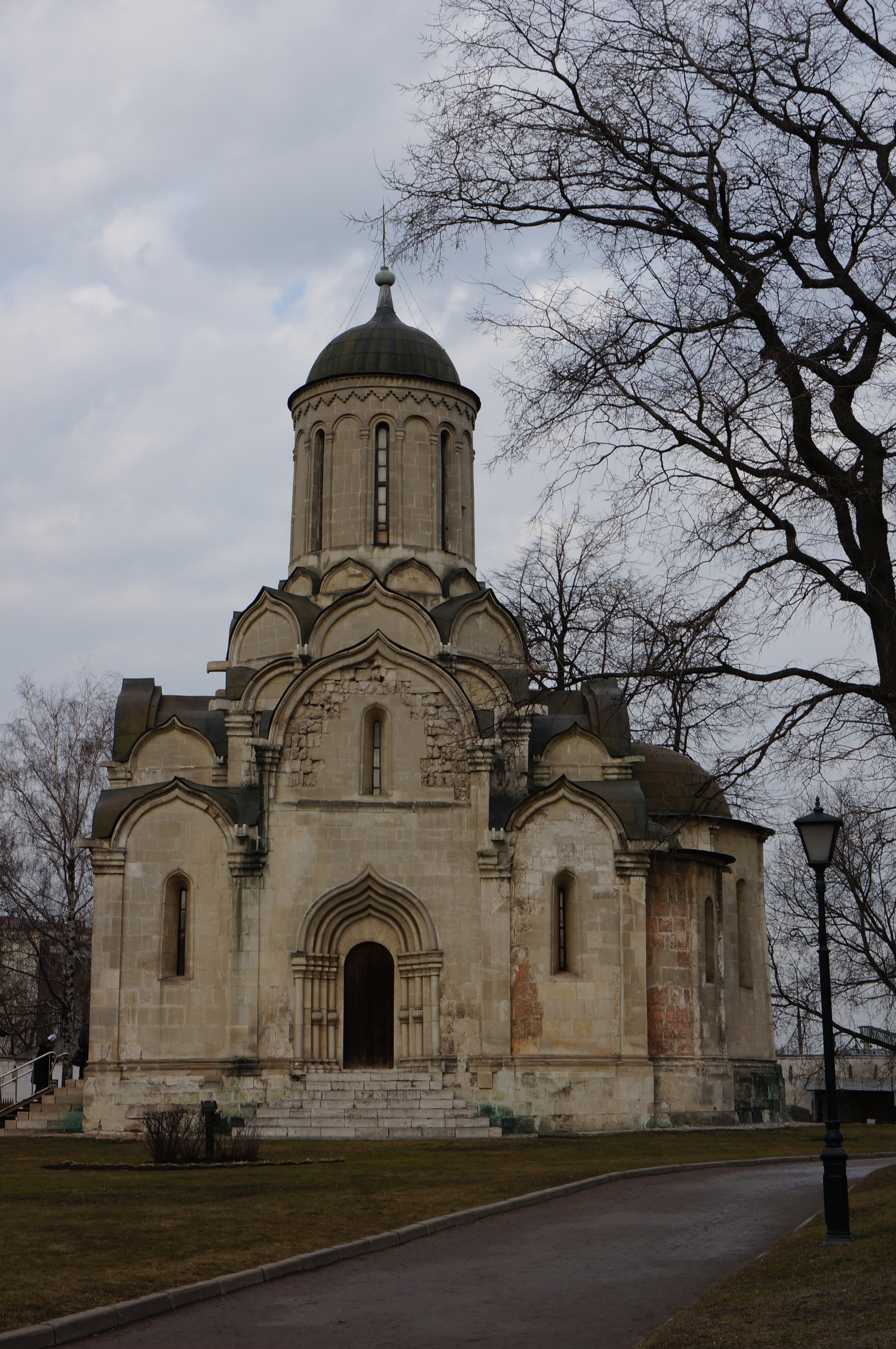 Ансамбль Андроникова монастыря (музей древнерусской культуры и искусства им. А. Рублева) (Москва и Московская область, Москва, Андроньевская площадь, 10)